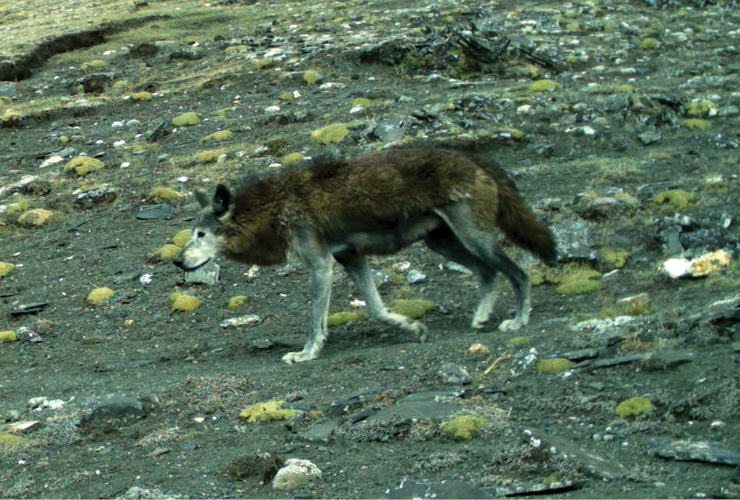 A Himalayan wolf photographed in Upper Mustang of Annapurna Conservation Area, Nepal (29.17356°N, 84.13422°E; datum WGS84, elevation 5,050 m) during May 2014.